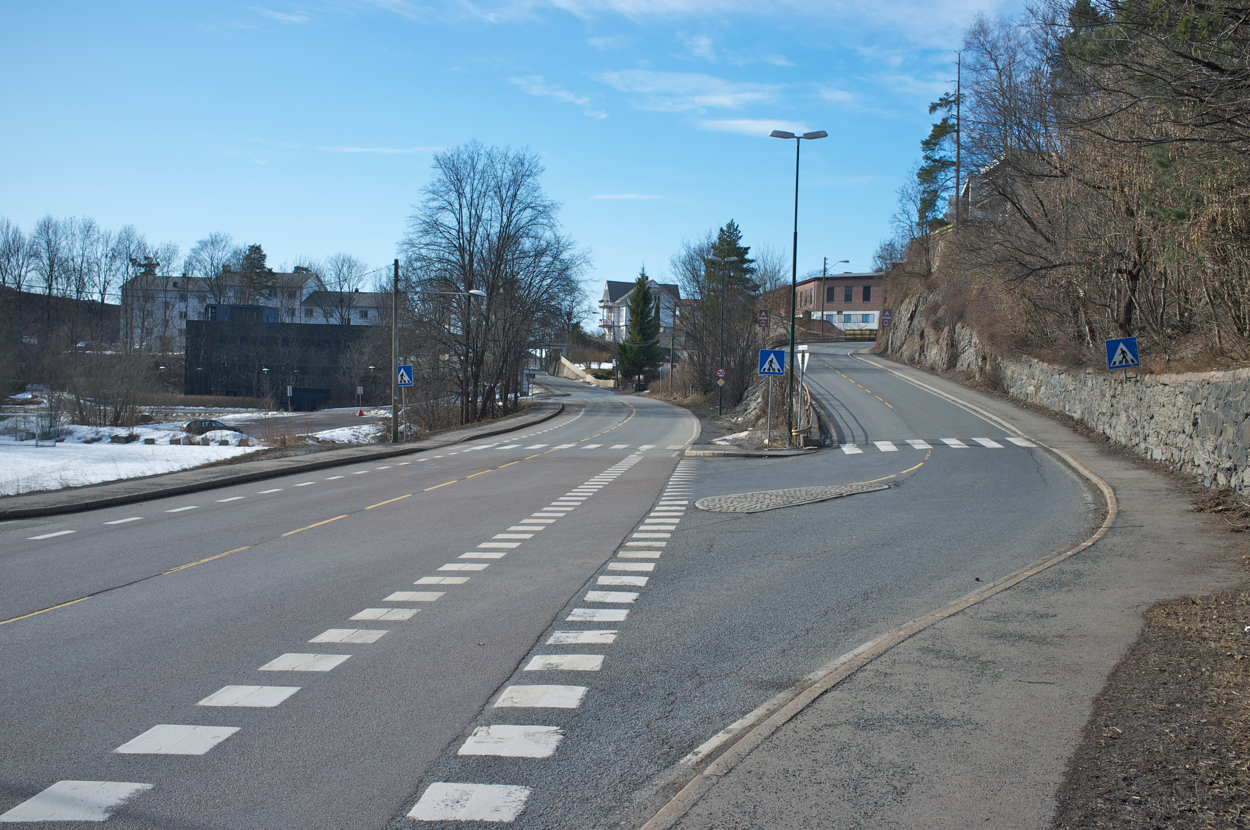 Professor Kohts vei (venstre) og Gamle Drammensvei (høyre). Lysaker i Bærum.